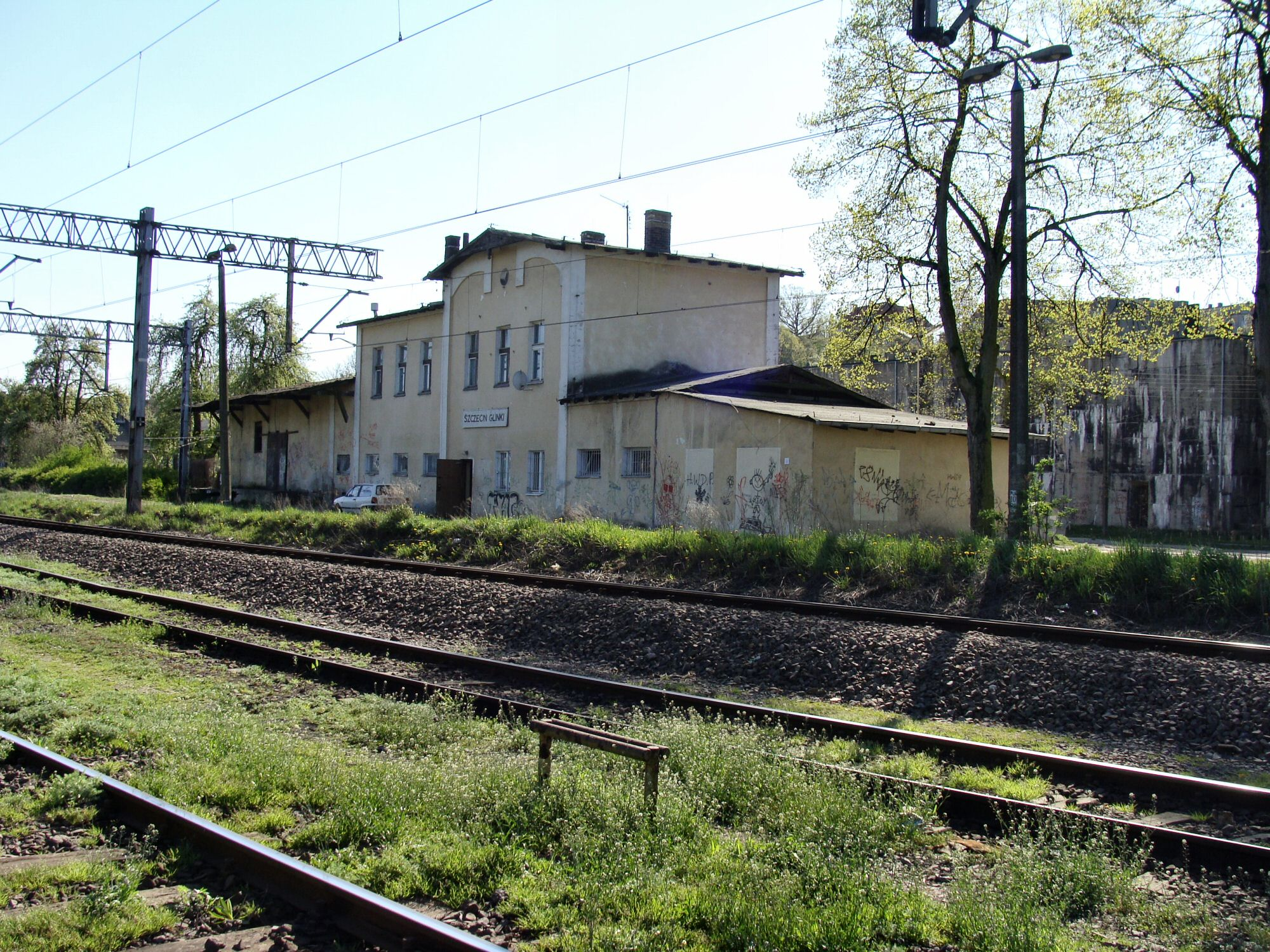 Stacja kolejowa Glinki w Szczecinie